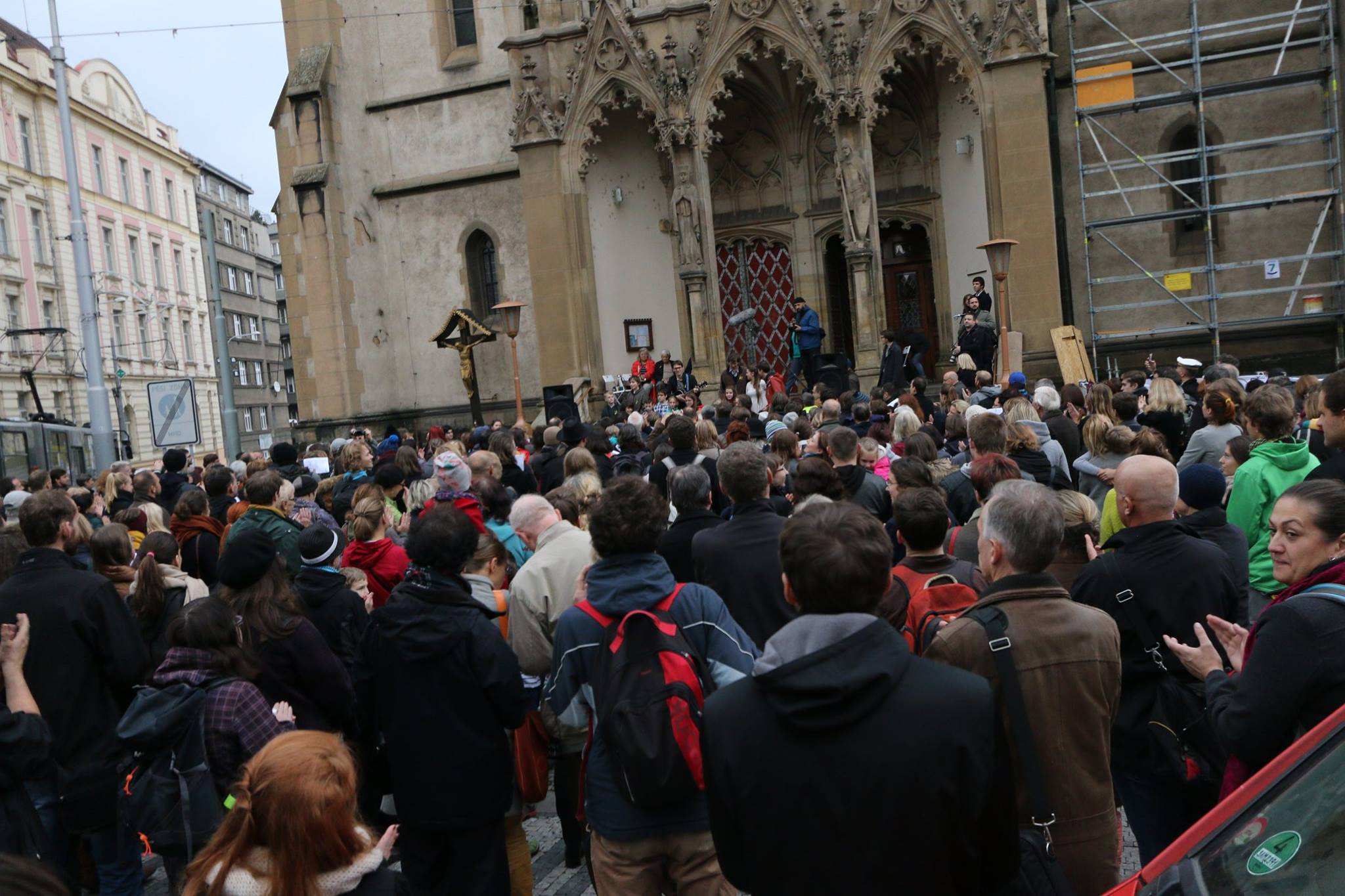 Účastníci shromáždění na podporu Jiřího Bradyho